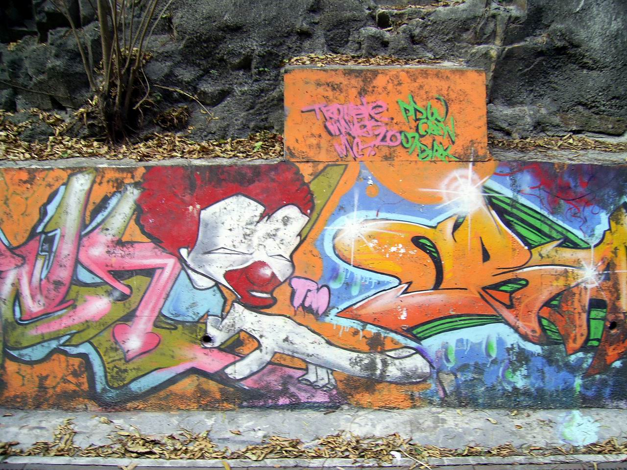 中文（香港）: 蒲窩青少年中心學員塗鴉作品